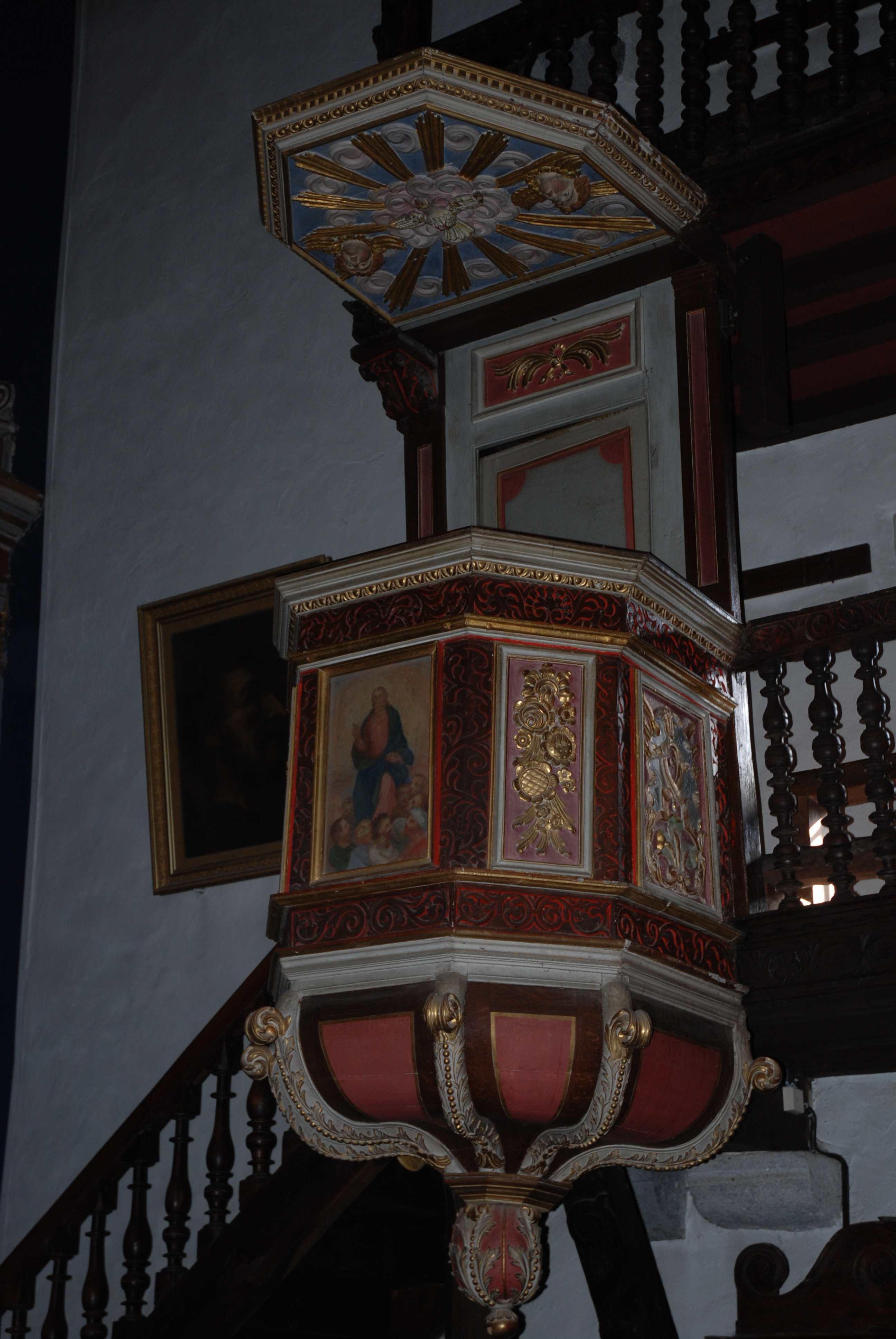 Itxassou, chaire à prêcher de l'église Saint-Fructueux